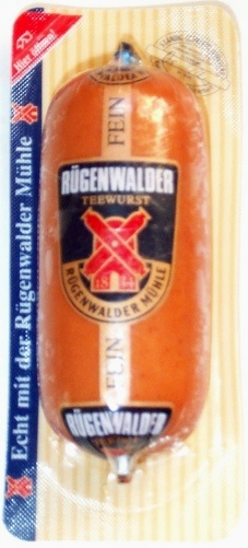 An unopened packet of Rügenwalder Teewurst.